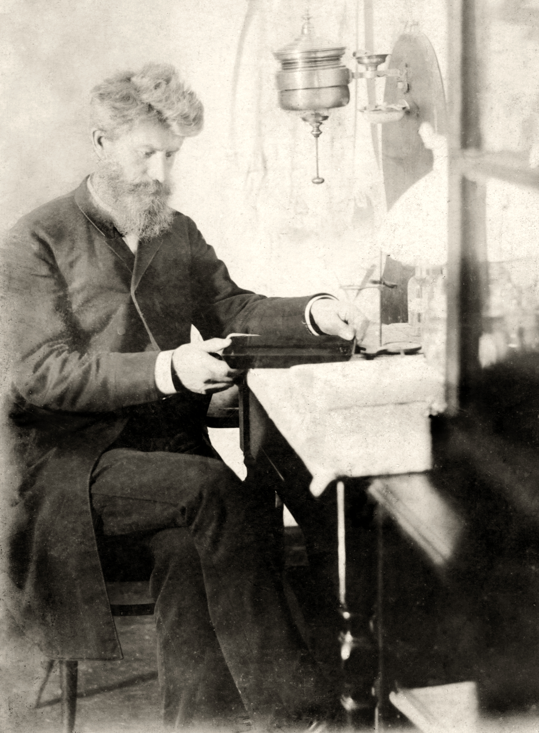 Ипполит Александрович Прощаков (1848-1911, Новочеркасск) — земский врач Черкасского округа (области Войска Донского).